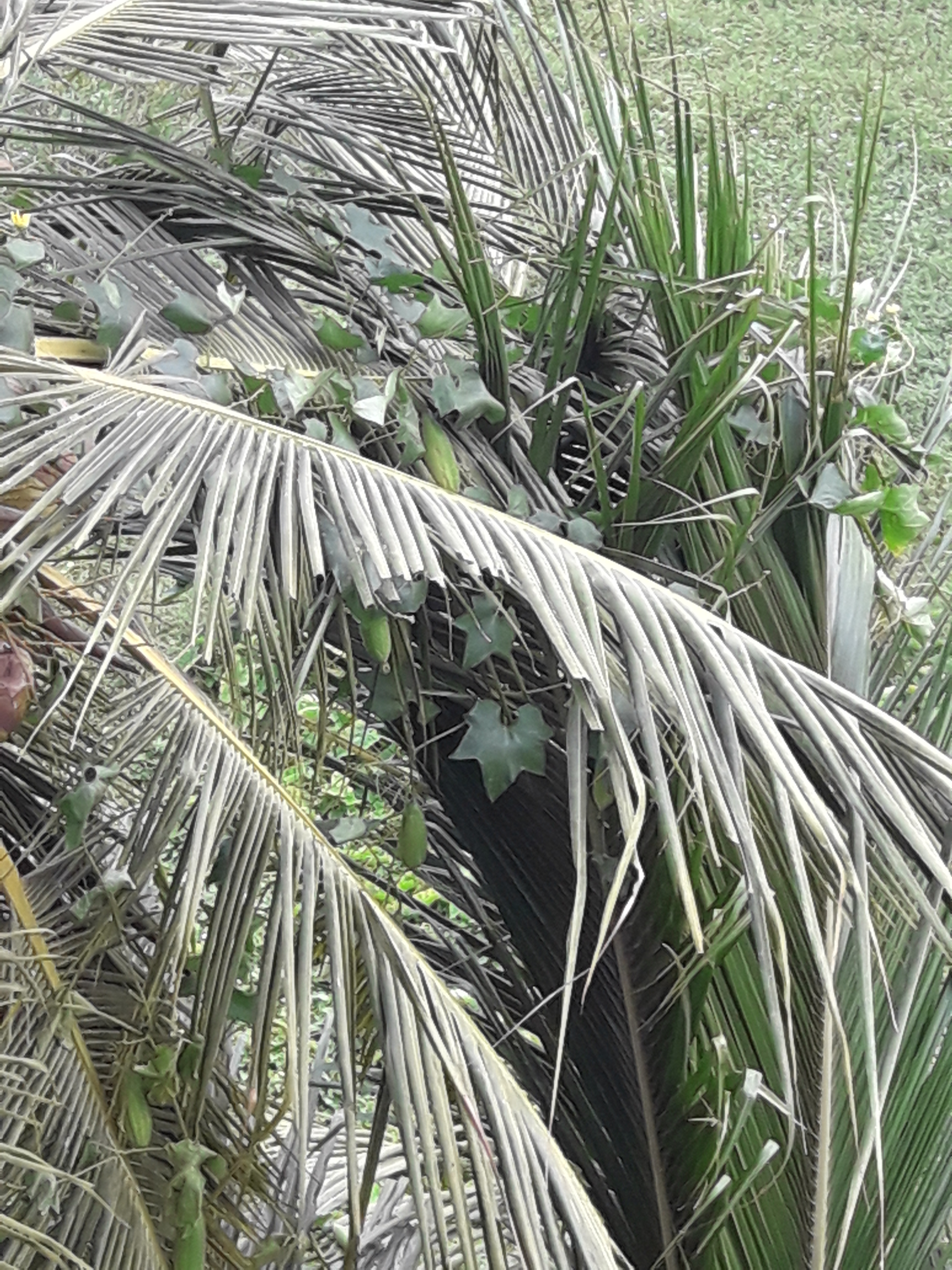 A vegetable item in kerala